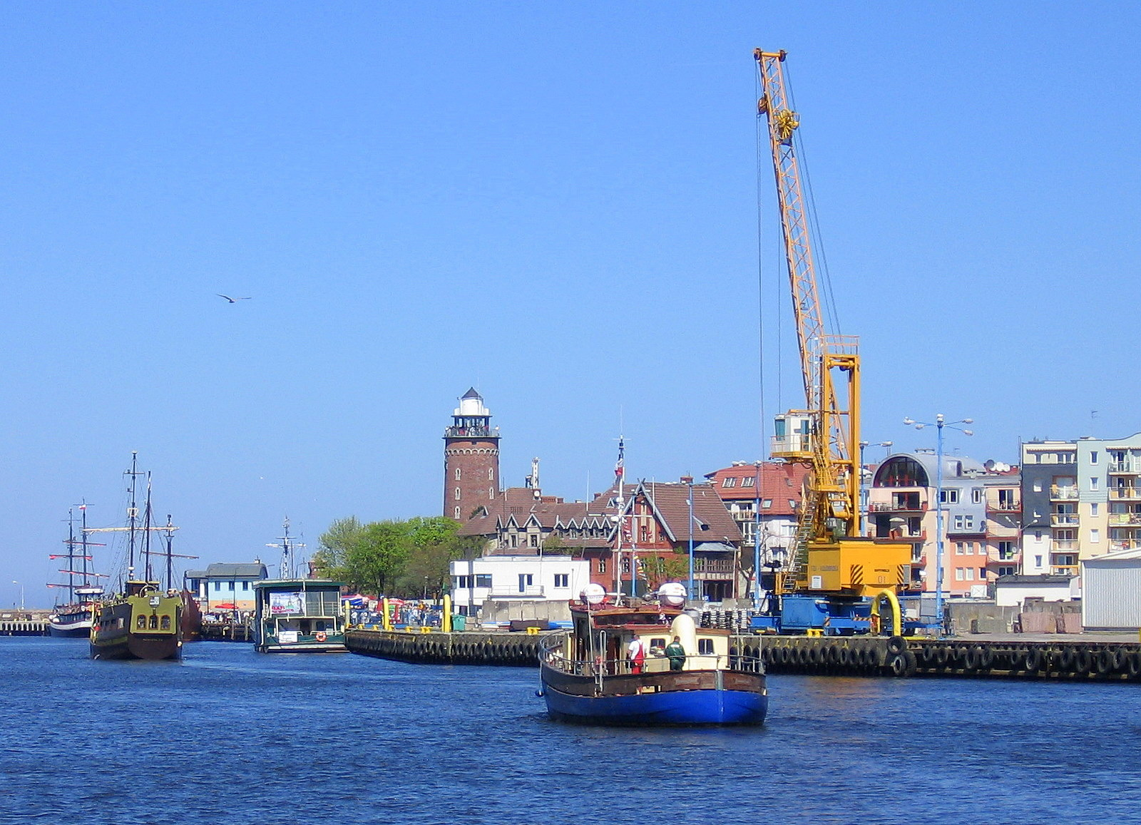 Wschodnie nabrzeże portu Kołobrzeg z odpływającym statkiem James Cook (POL 9913)